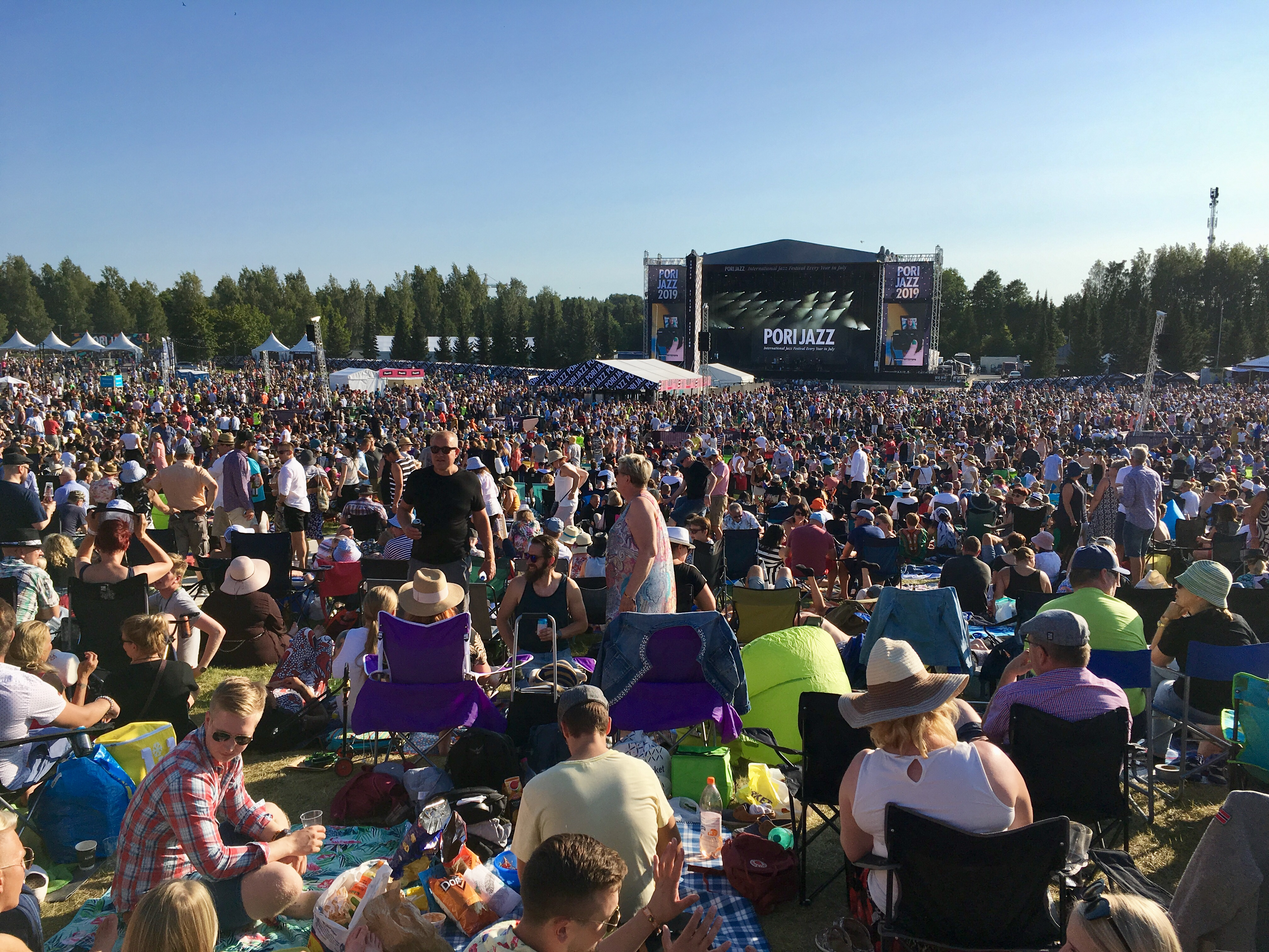 Pori Jazz 2019